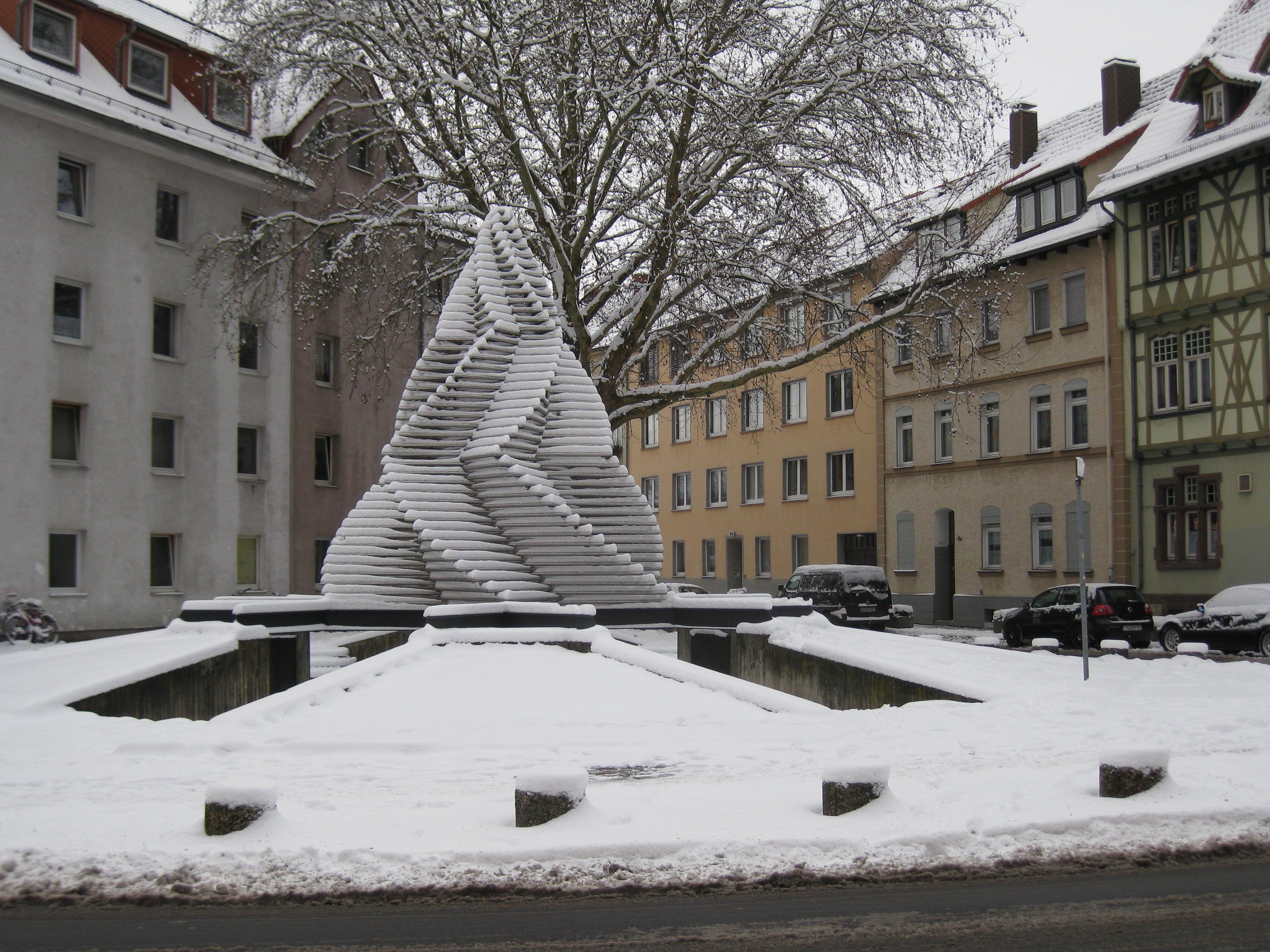 Das Denkmal ist an dem Platz errichte worden, an dem bis 1938 die Synagoge der jüdischen Gemeinde in Göttingen stand.